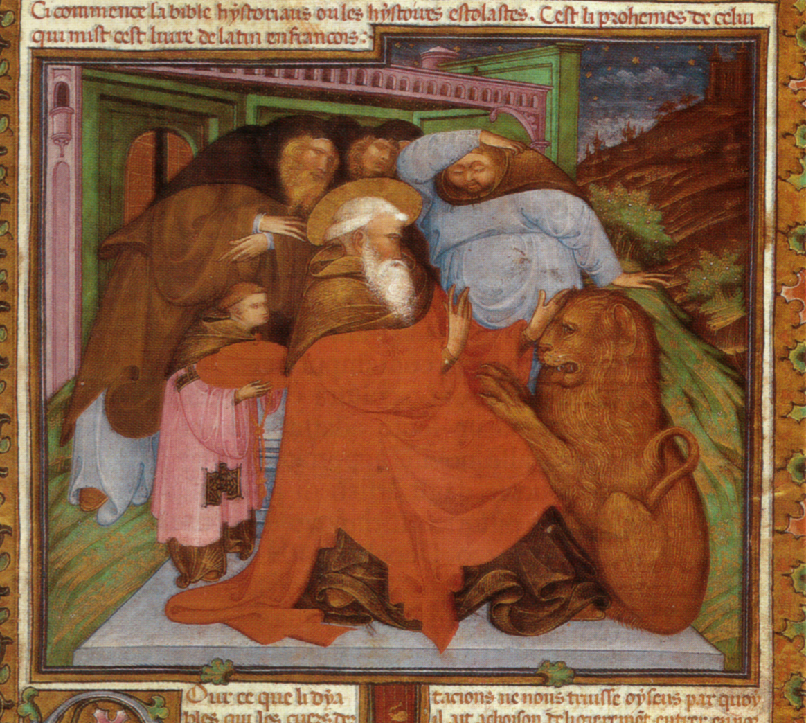 Belbello da pavia, san girolamo, da bibbia miniata di niccolò d'este, 14131-34, ms. barberiniano lat. 613, f. 630r, biblioteca apostolica vaticana